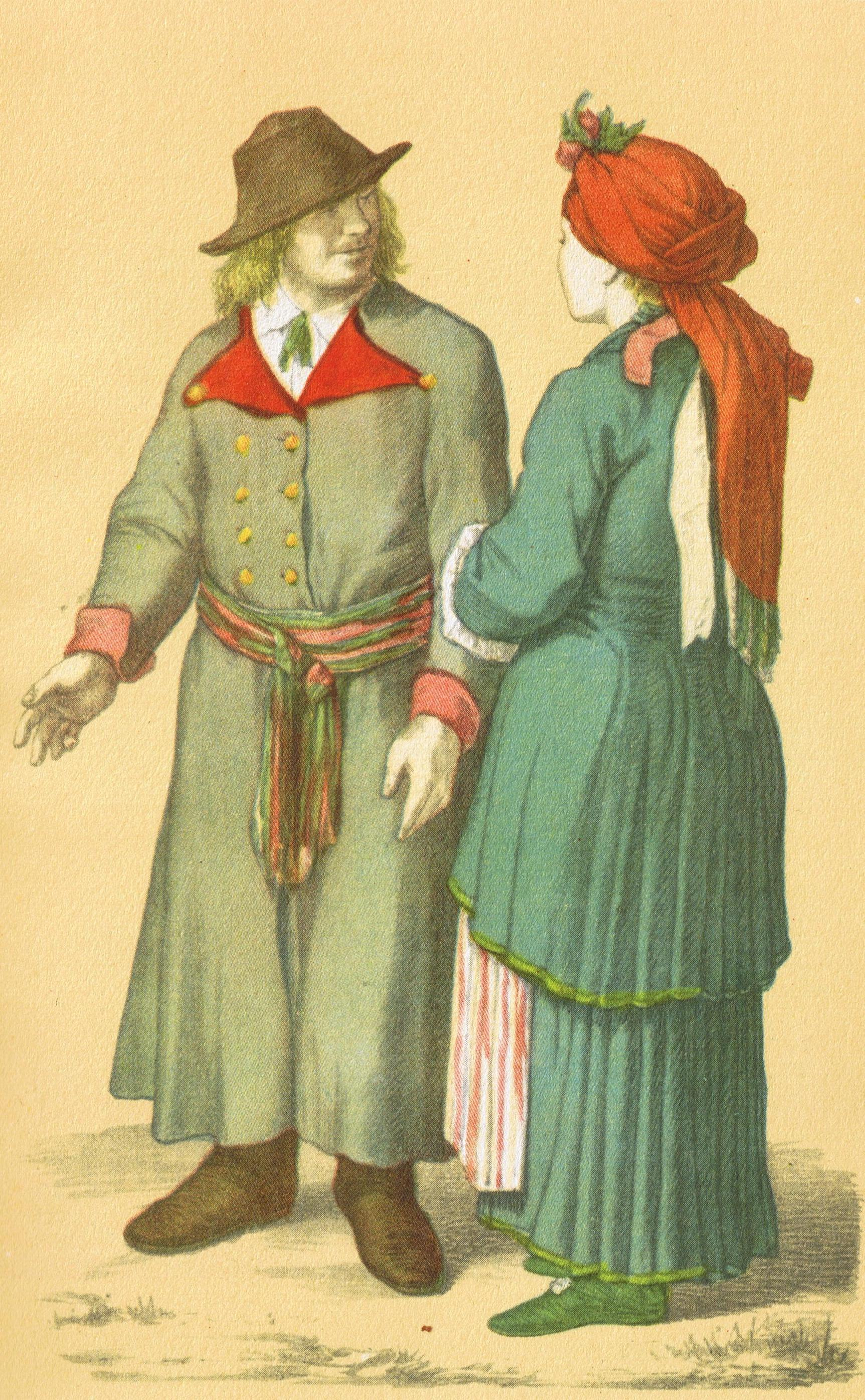 Ilustracja do "Pieśni ludu Polskiego" Oskara Kolberga z 1857 r.; rys. Wojciech Gerson, lit. Maksymilian Fajans